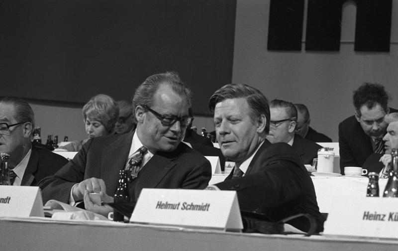 Bundesparteitag der SPD in Hannover (links: Willy Brandt, rechts: Helmut Schmidt) 10.-14.4.1973